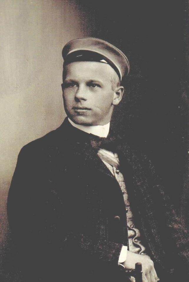 Porträtaufnahme von Emil Scheel als Student in Tübingen